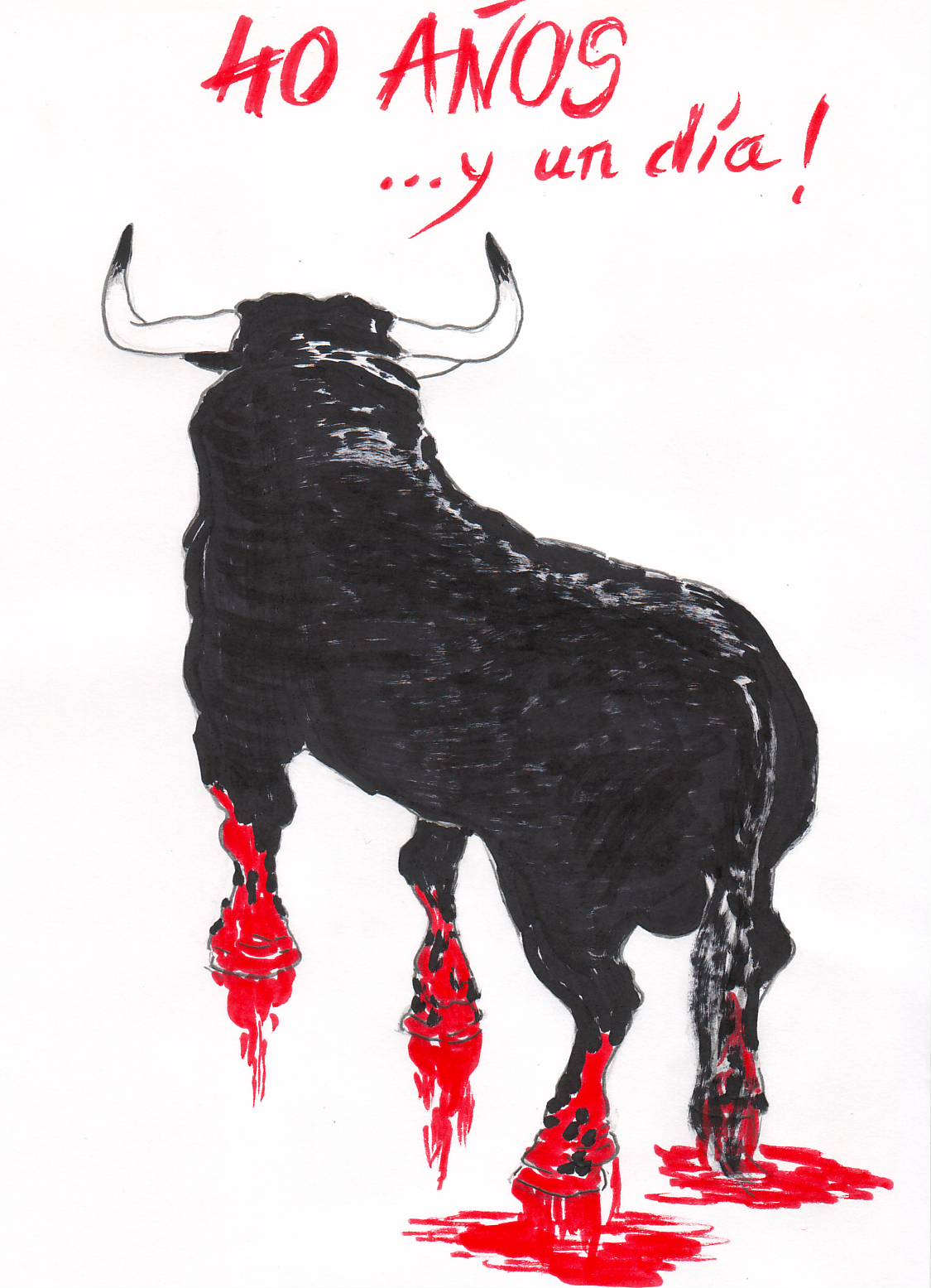 Imagen homenaje creada por usuarios de Wikipedia, como falso cartel conmemorativo del 40 aniversario del grupo de teatro independiente La Cuadra de Sevilla, a partir de un dibujo del usuario Tolijote, colaborador ya jubilado, que cedió todos los derechos de uso.Artículo en ABC de Sevilla, titulado "Cumplimos 40 años..." publicado en 04/03/2012 , donde Salvador Távora reflexiona sobre las cuatro décadas al frente de su compañía.